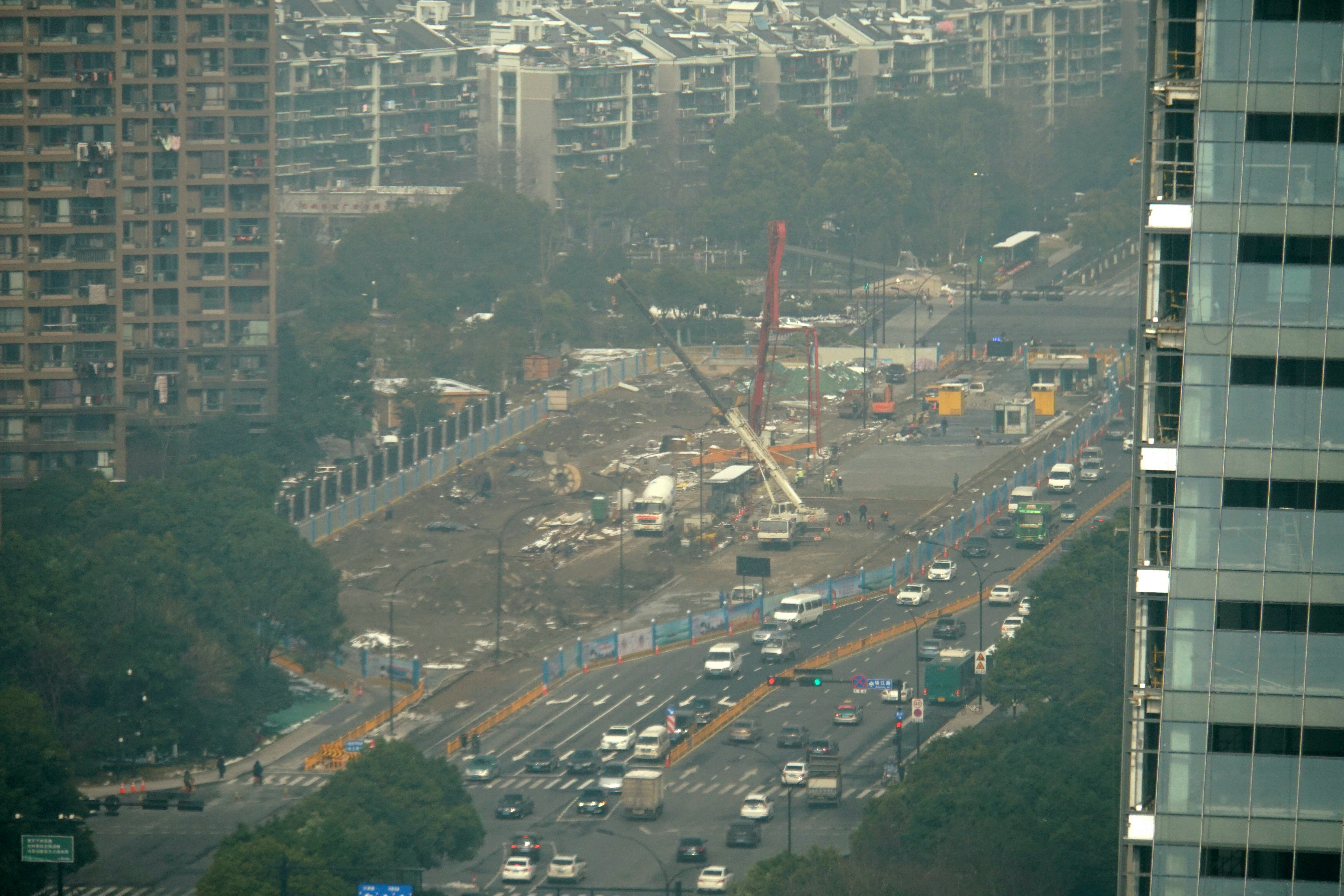 9号线钱江路建设工地，2018年2月1日